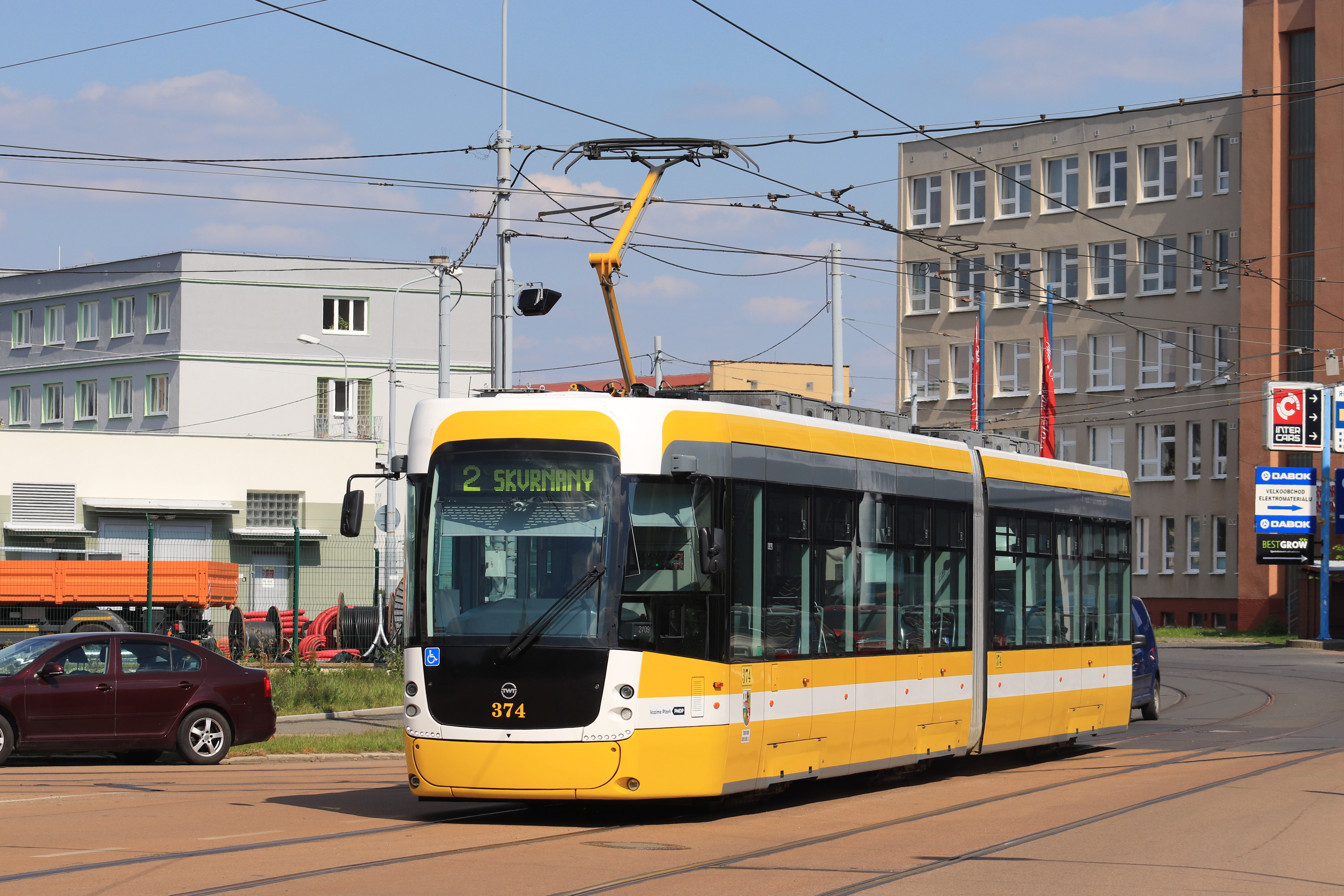 Tramvaj EVO2 dopravce PMDP